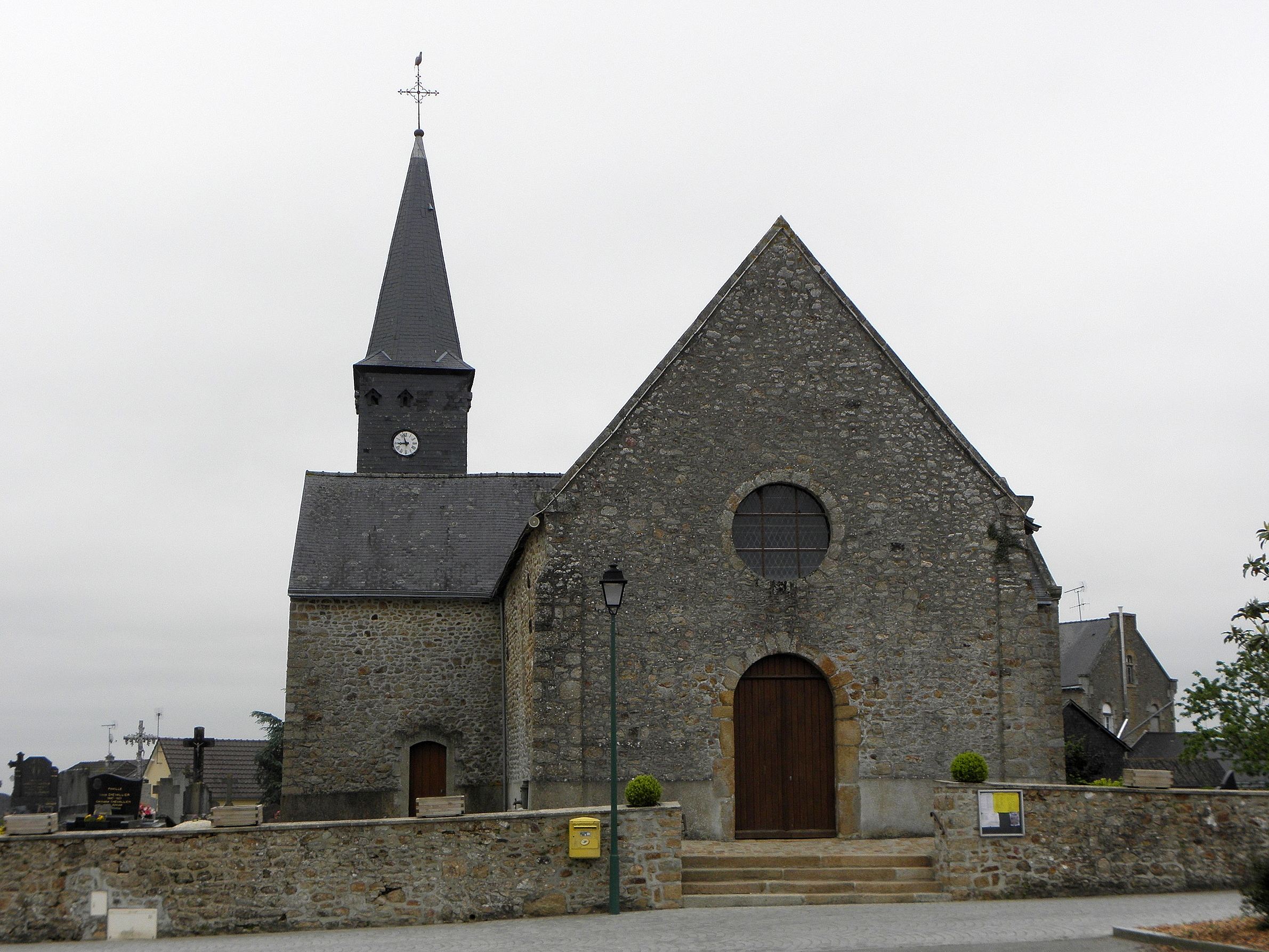 Église de Saint-Cyr-le-Gravelais (53). Façade occidentale.